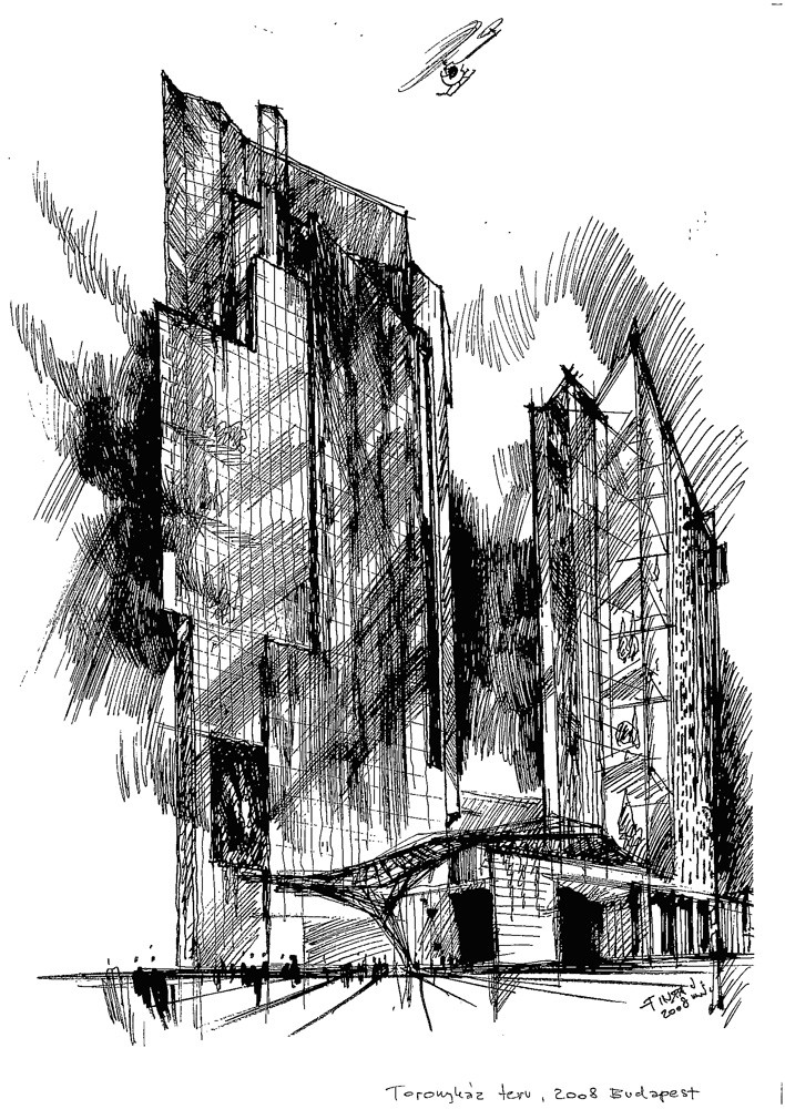 Skicc: toronyház